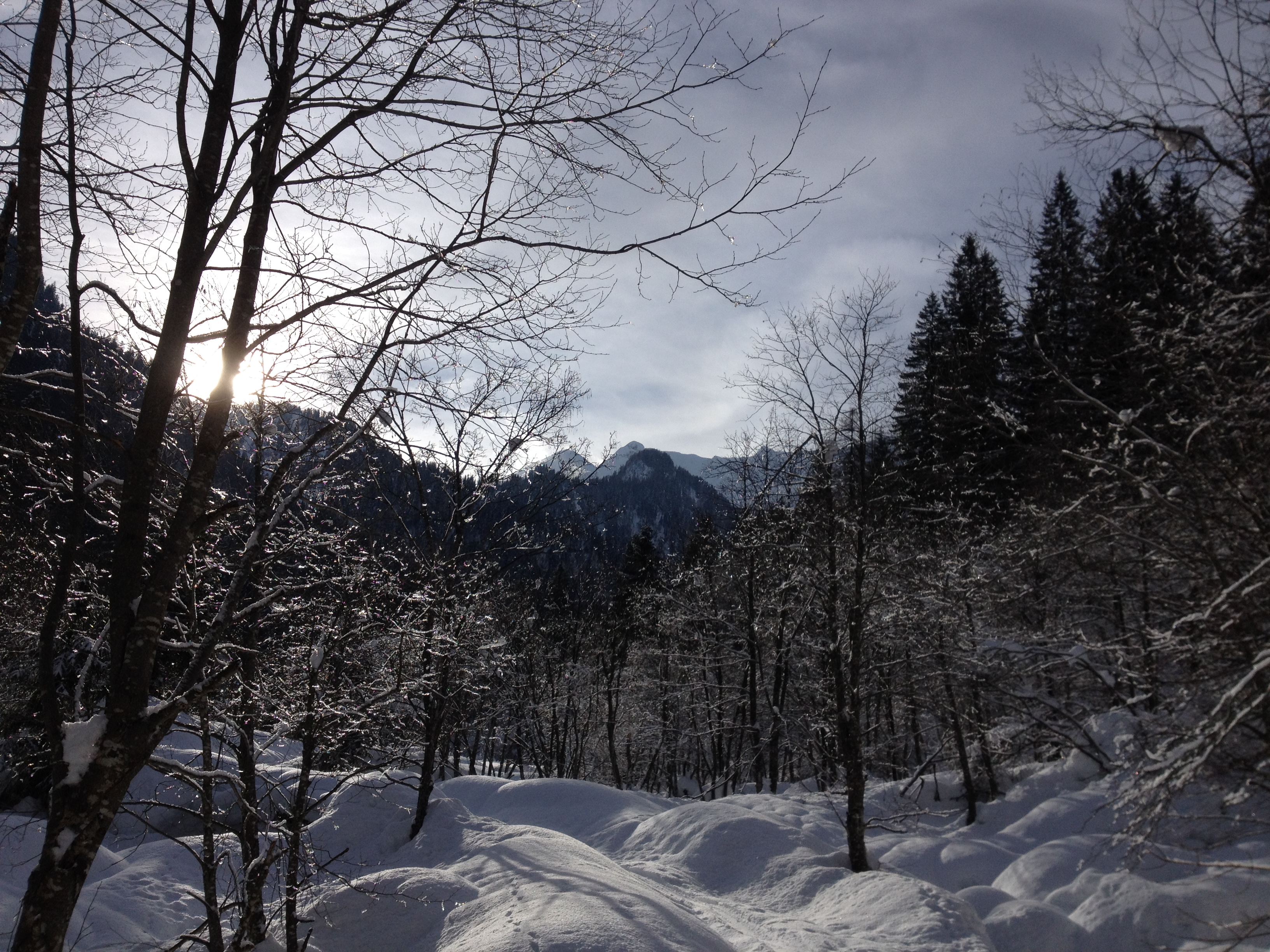 im mittleren Kronhofgraben bei Brücke über den Frondell-Bach